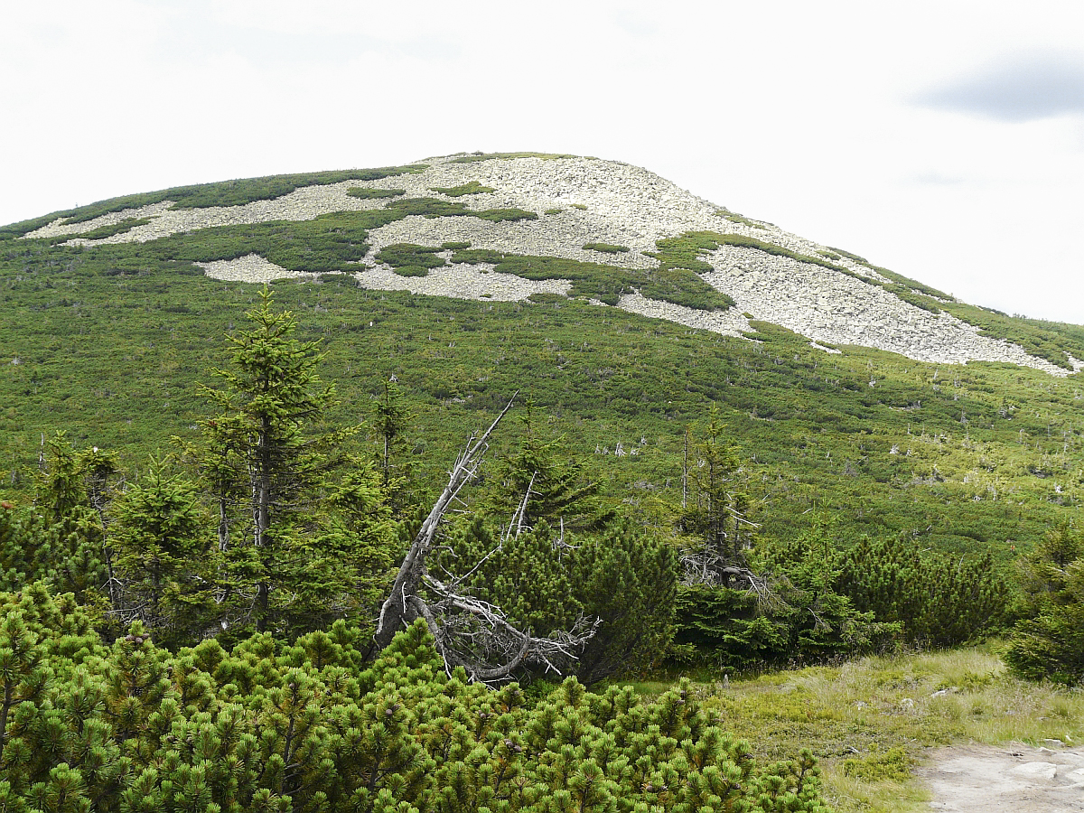 Karkonosze